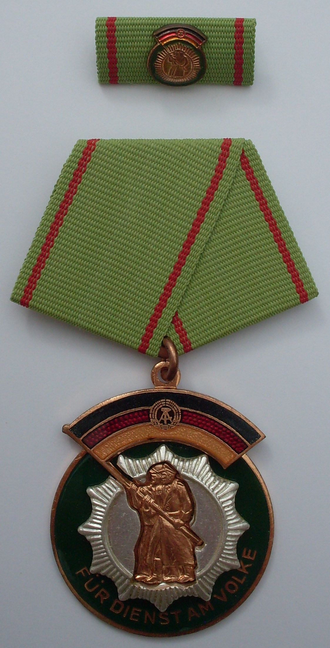 Ehrenzeichen der Deutschen Volkspolizei der DDR (vierte Form 1965-1990).